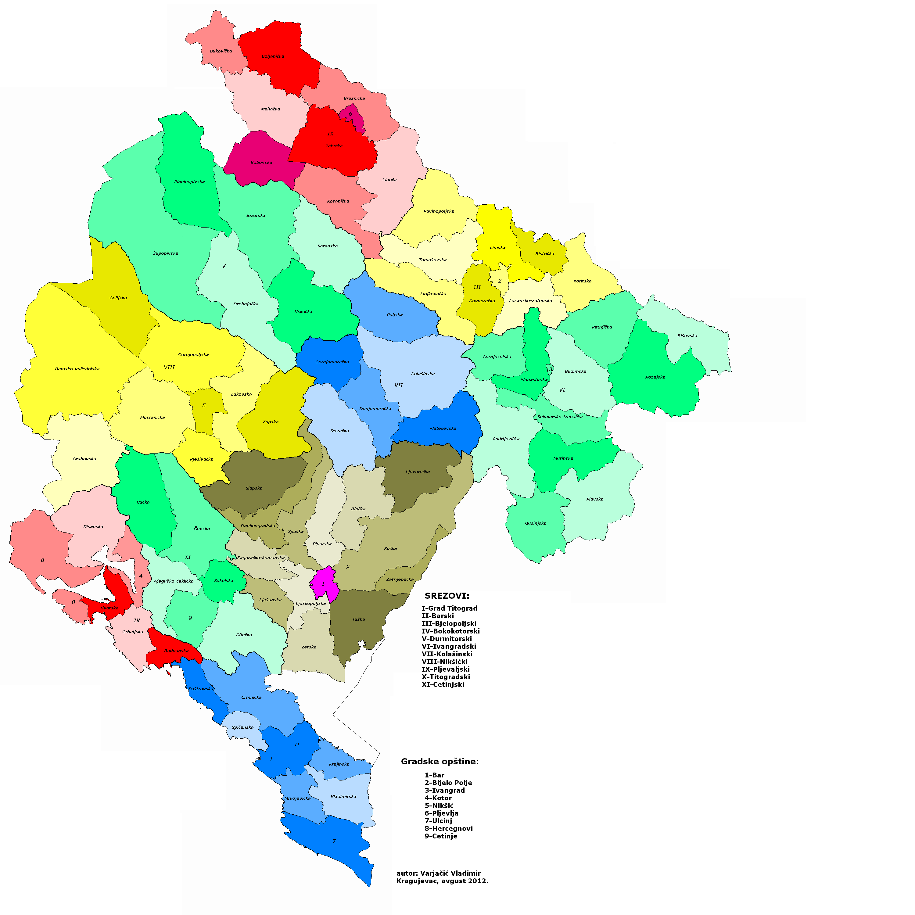 Општине и срезови у Црној Гори 1952—1955. године